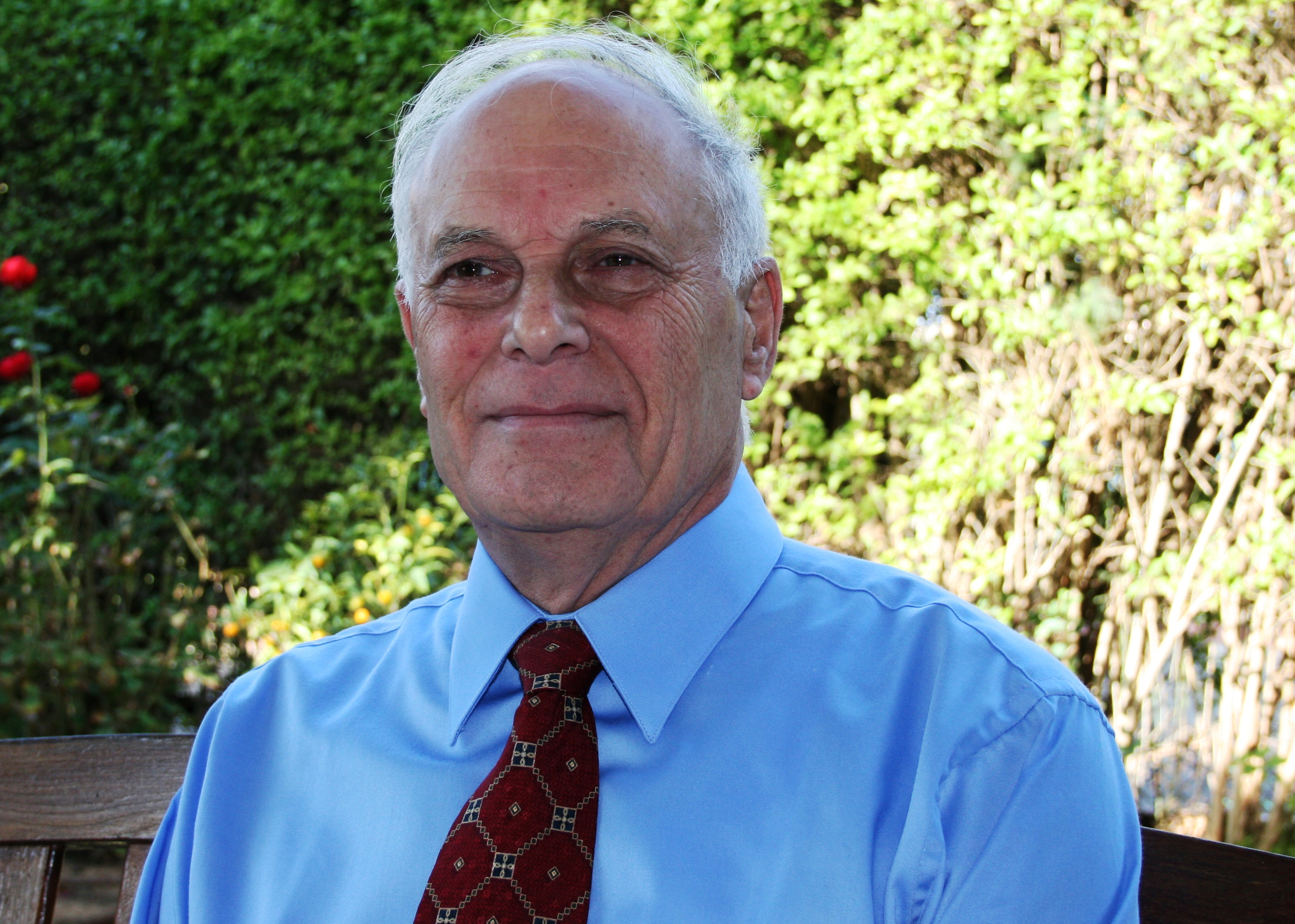 פרופסור אריאל מררי